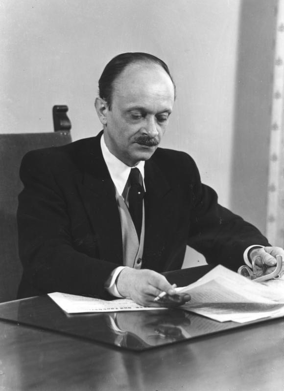 Felix von Eckardt Chef des Presse- und Informationsamtes der Bundesregierung vom 16.2.1952-30.4.1955 und vom 1.7.1956-30.6.1962